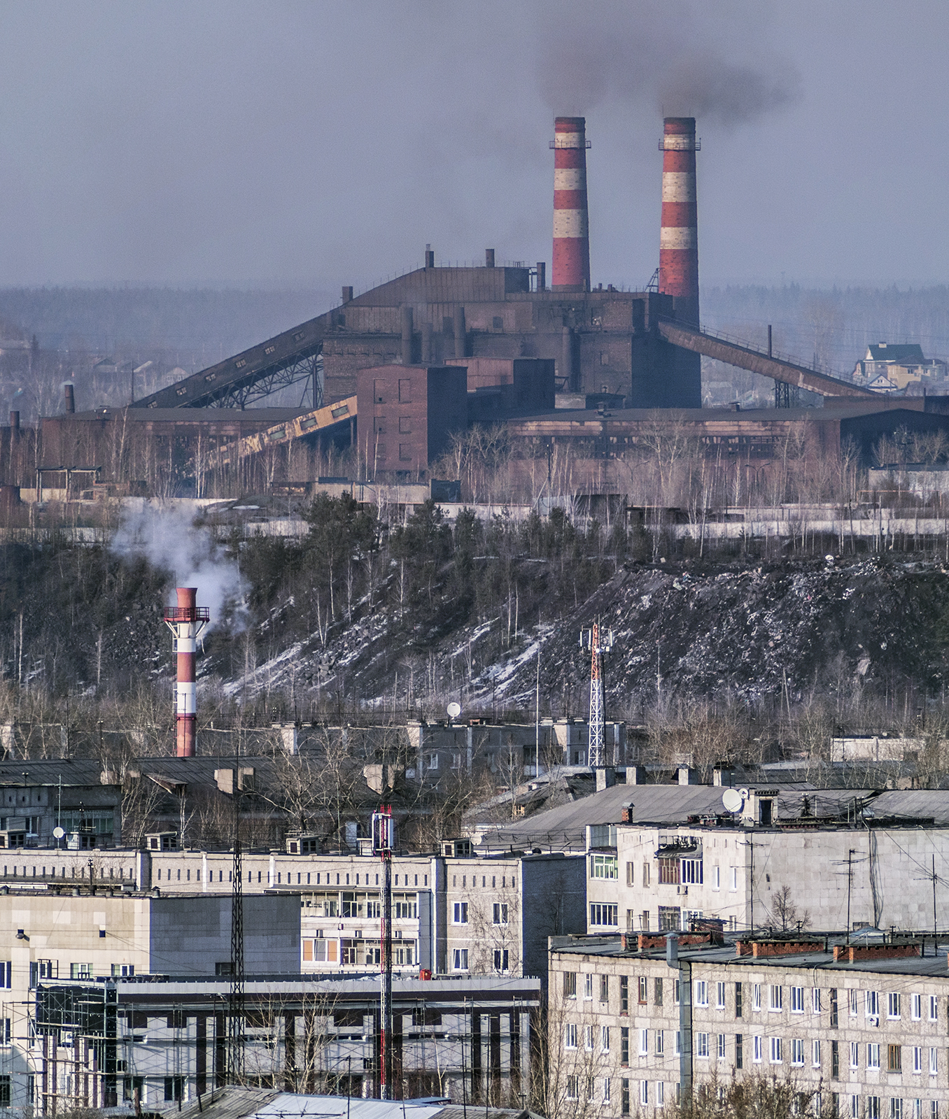 Лебяжинский аглоцех.